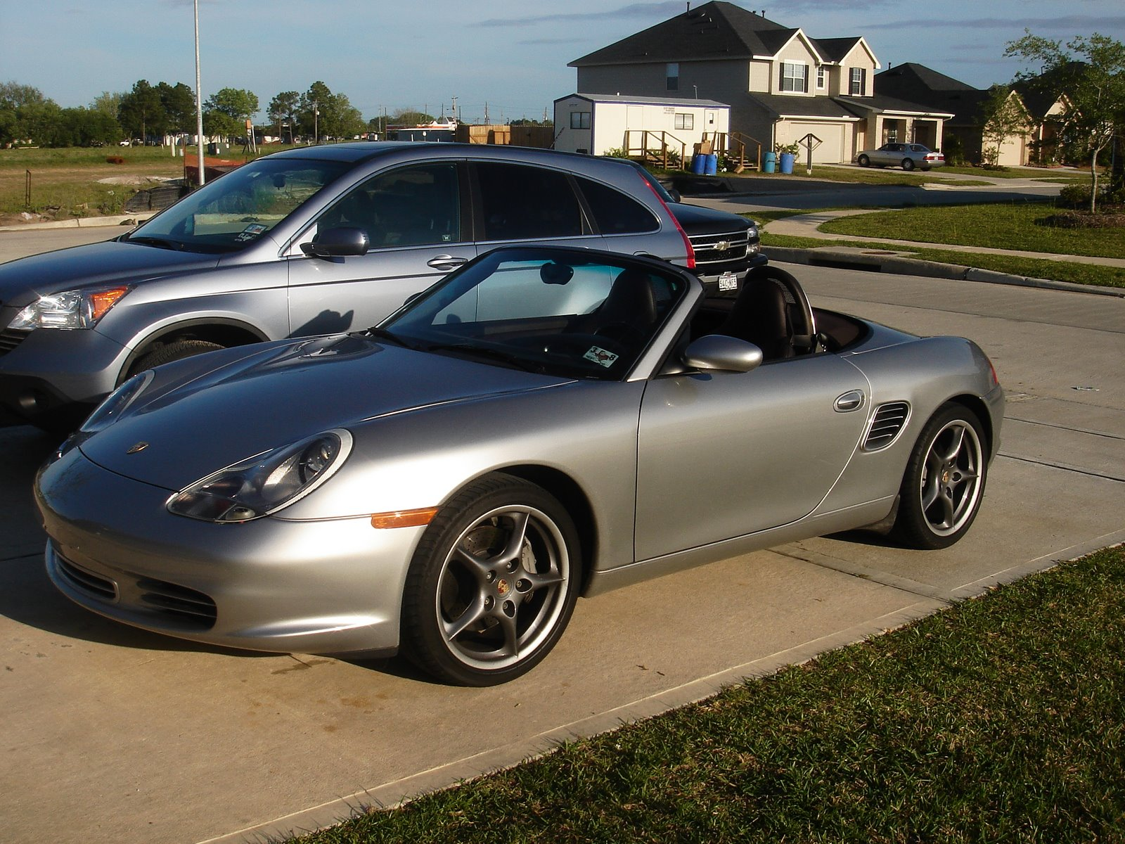 Photographer: Matthew Wolkenberg